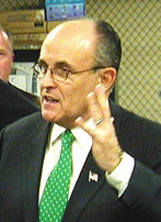 Rudy Giuliani